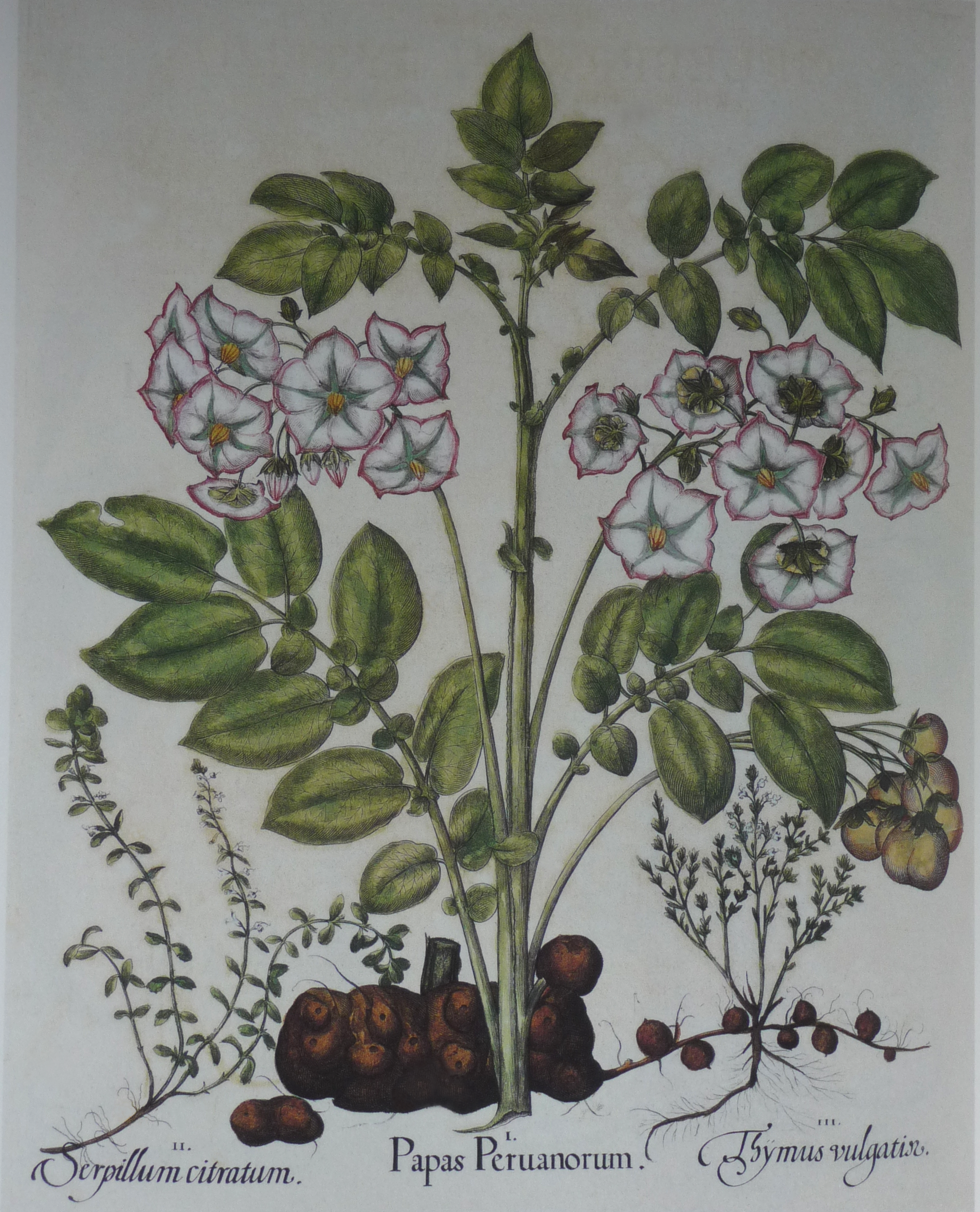 Papas peruanorum